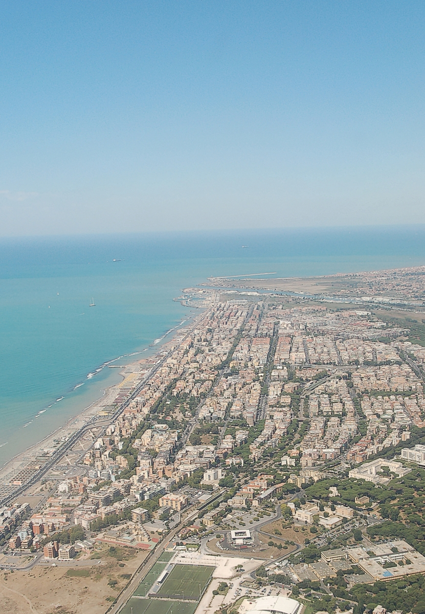 Ostia 2011 Durch die Übernahme der UMTS Kosten durch den gemeinnützigen Vereins Skillshare.eu konnte dieses Bild bereitstellen werden. Skillshare e.V. ist ein eingetragener gemeinnütziger Verein zur Förderung der Bildung durch Unterstützung der Erstellung, Sammlung und Verbreitung so genannten freien Wissens. IBAN: DE16 8306 5408 0004 8850 66 BIC: GENODEF1SLR Bank: VR-Bank Altenburger Land